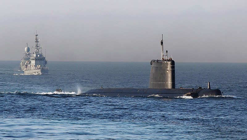 حشمت - رزمایش مشترک دریایی ایران و پاکستان در تنگه هرمز